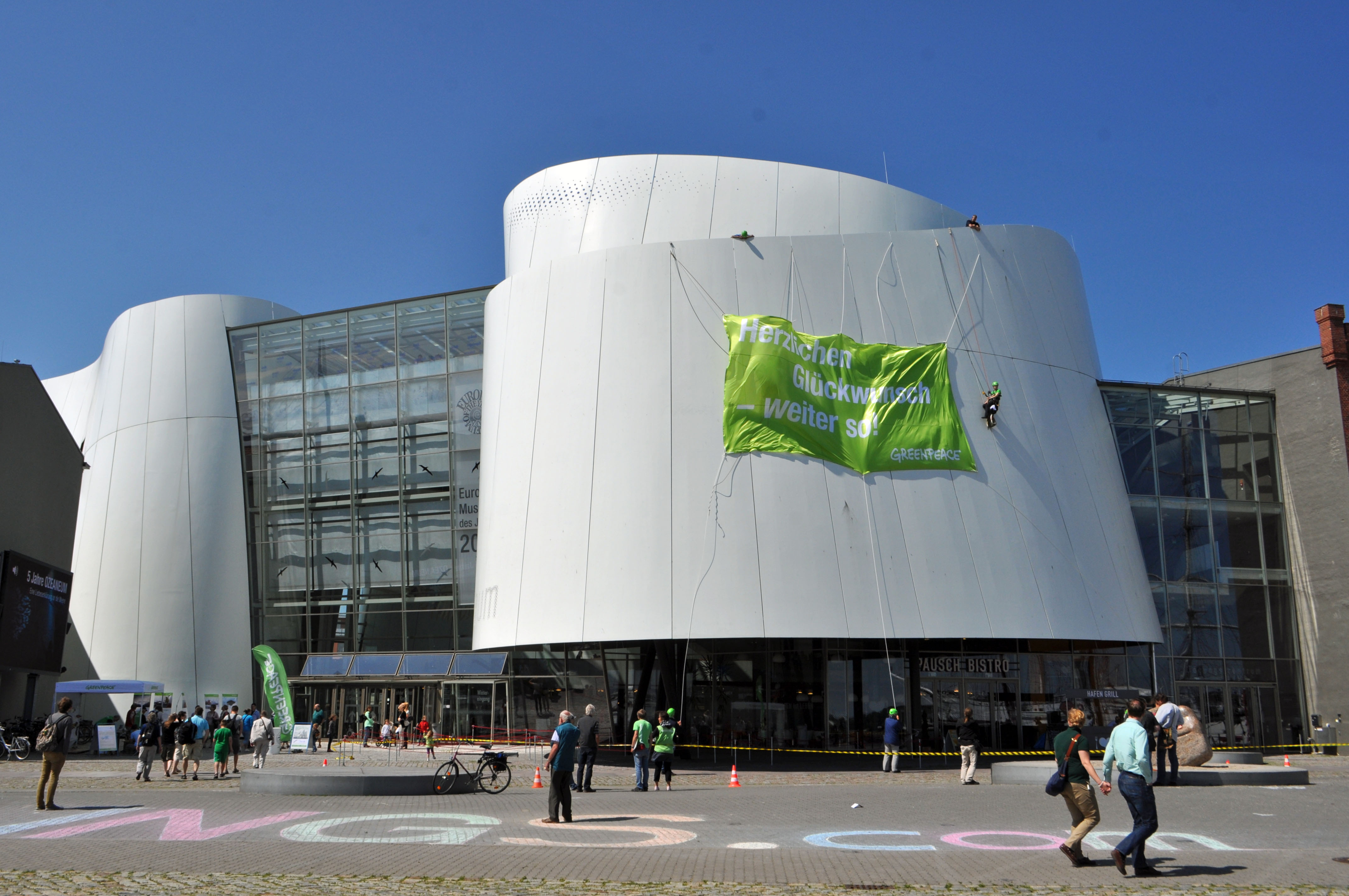 Fassadenkletterer der Organisation Greenpeace bringen bei kräftigem Wind an der Fassade des Ozeaneums ein TRansparent anlässlich des fünfjährigen Bestehens des Museums an. Greenpeace ist ein Förderer der Ausstellung "1:1 Riesen der Meere" im Ozeaneum. Die Aufschrift auf dem Transparent lautet "Herzlichen Glückwunsch! - Weiter so!".